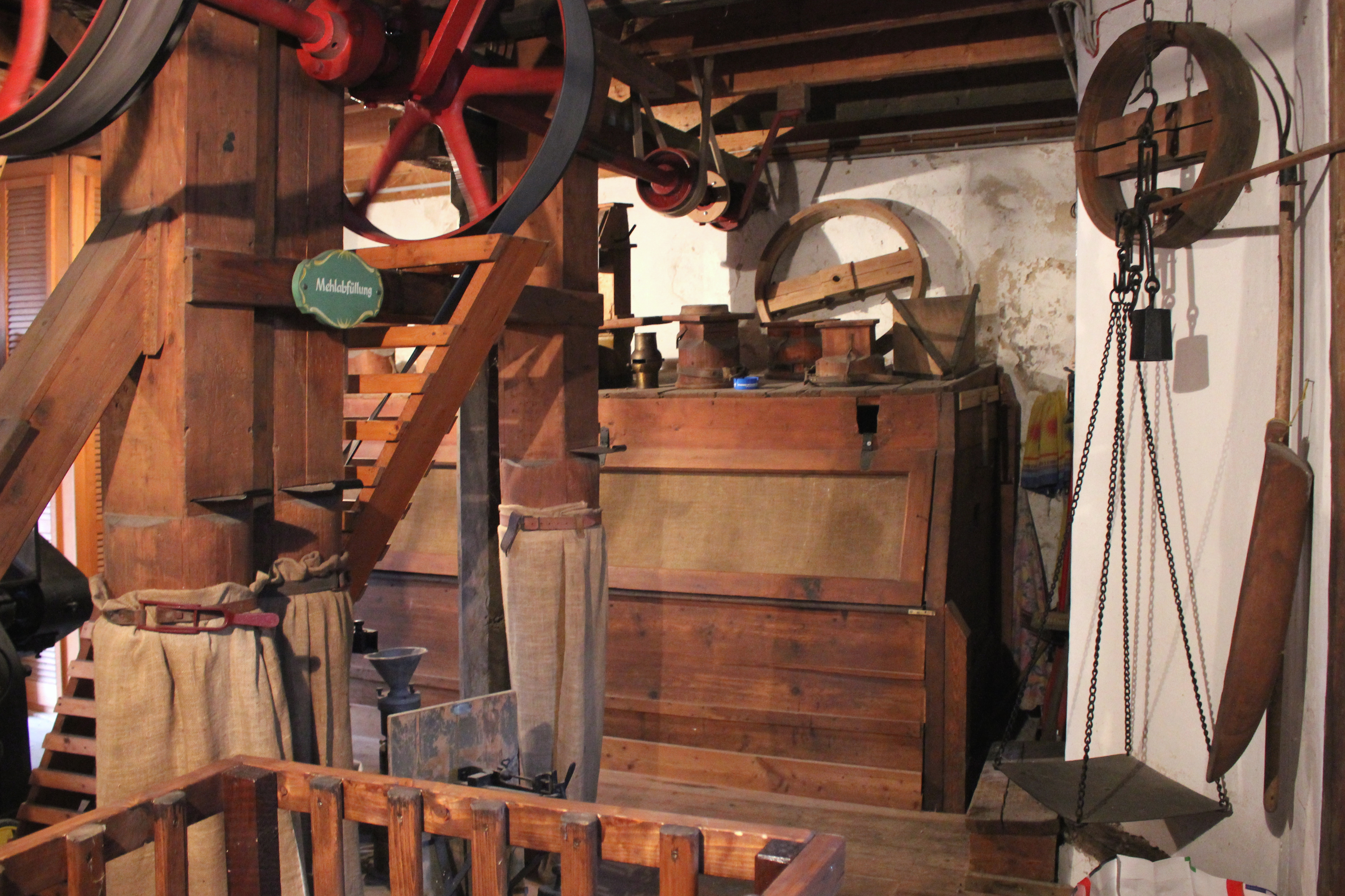 Hein’s Mühle in Sayn, Mehlabfüllung